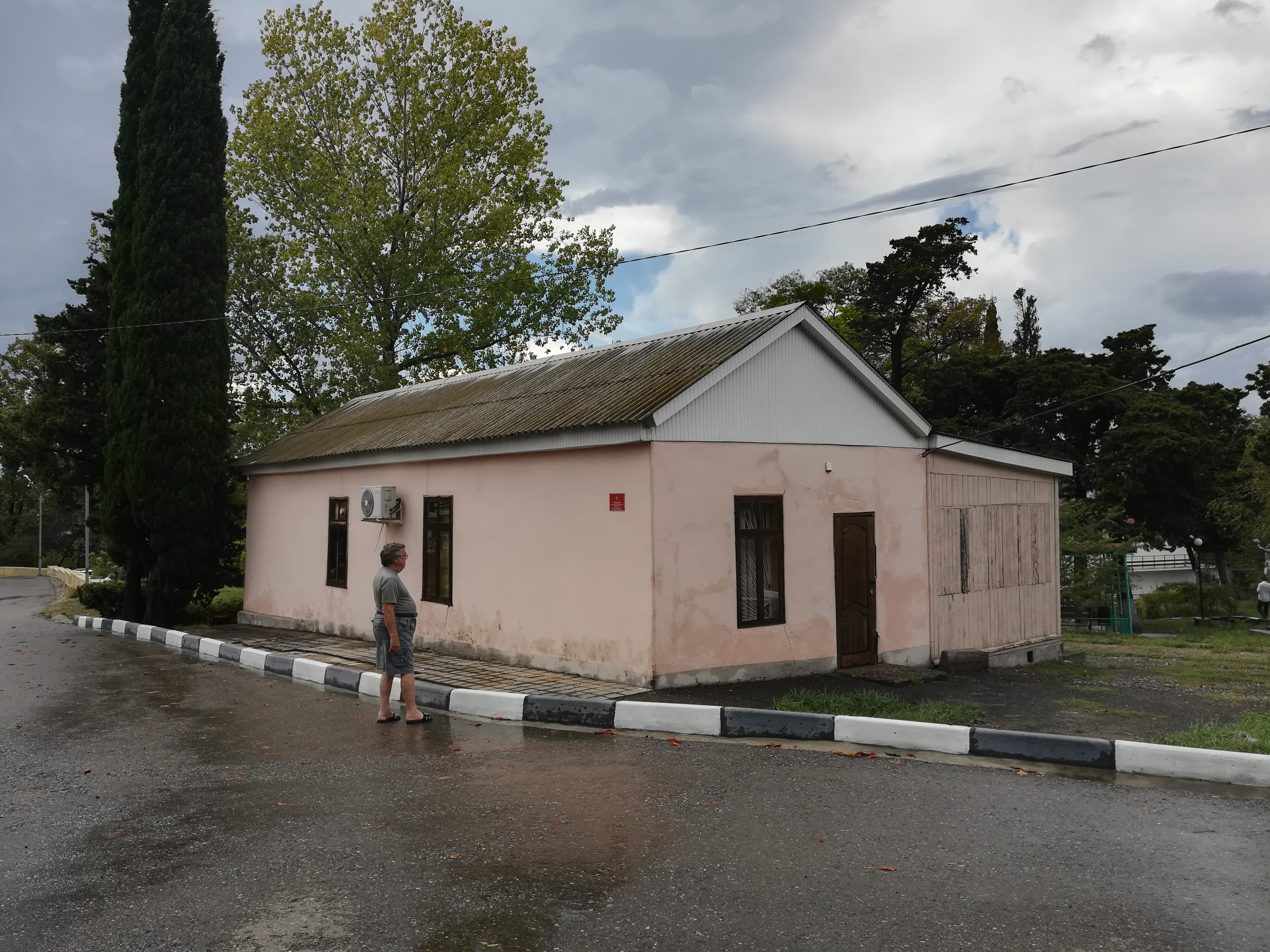 Вишневка